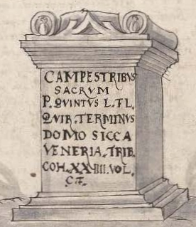 Campestres-Altar, Benningen am Neckar. Original: Römisches Lapidarium Stuttgart. Abbildung: Zeichnung aus Simon Studion: Vera origo illustrissimae et antiquissimae domus Wirtenbergicae … [Marbach am Neckar] 1597, Seite 69v.